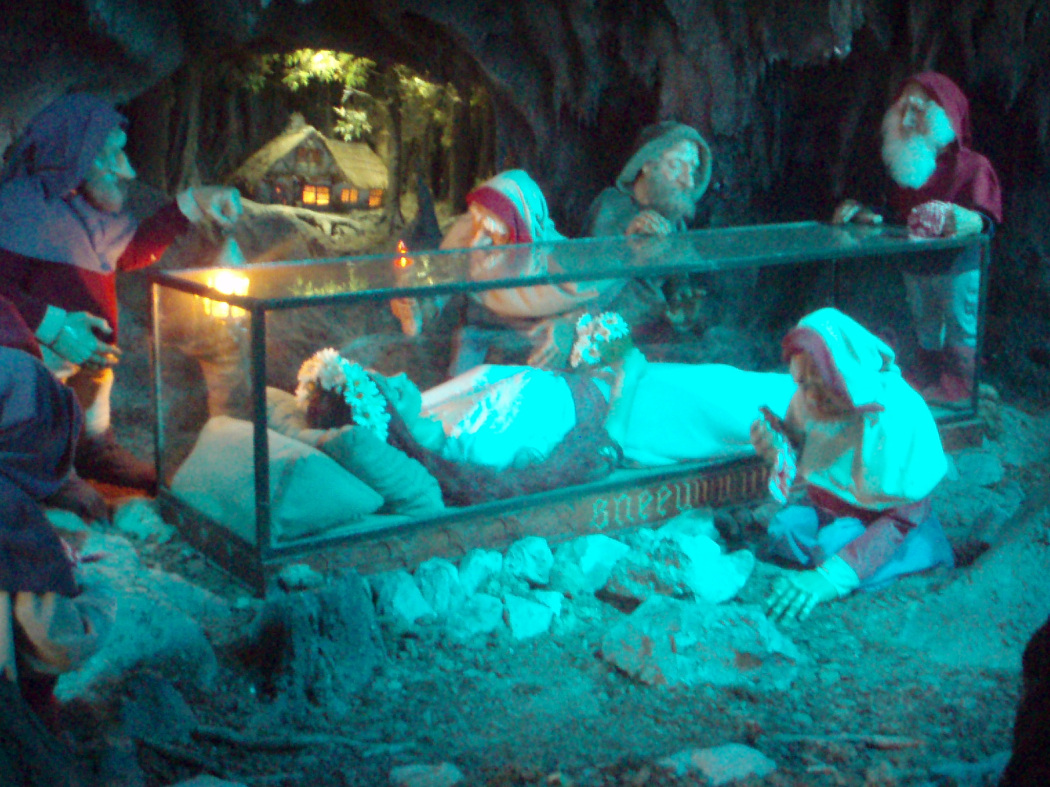 Sneeuwwitje in de Efteling.